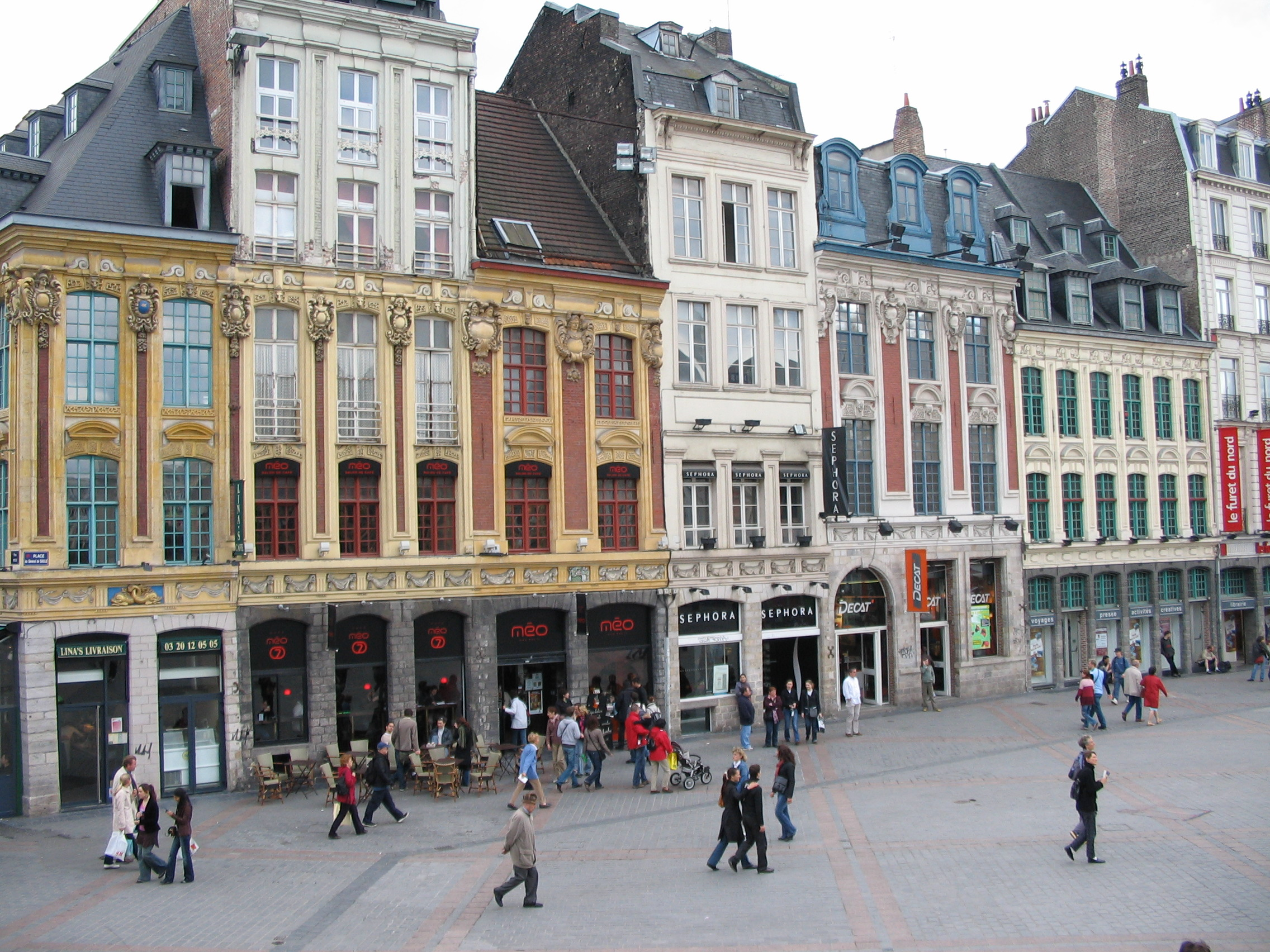 Pourtour commerçant de la Grand Place de Lille, Nord.